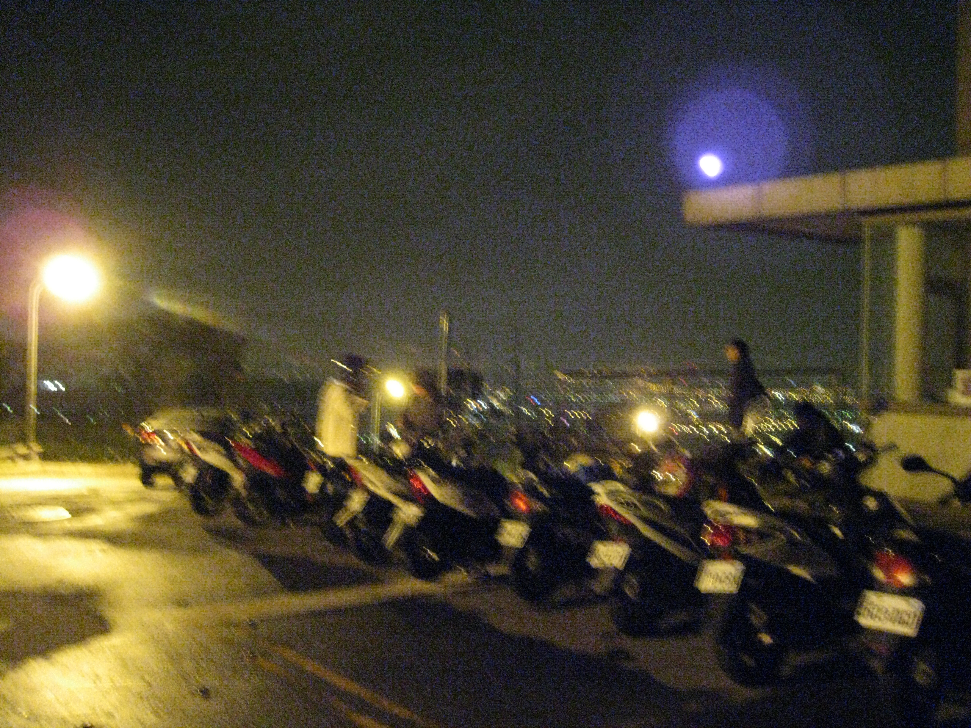 中文（台灣）: 中國文化大學後山情人坡夜景。